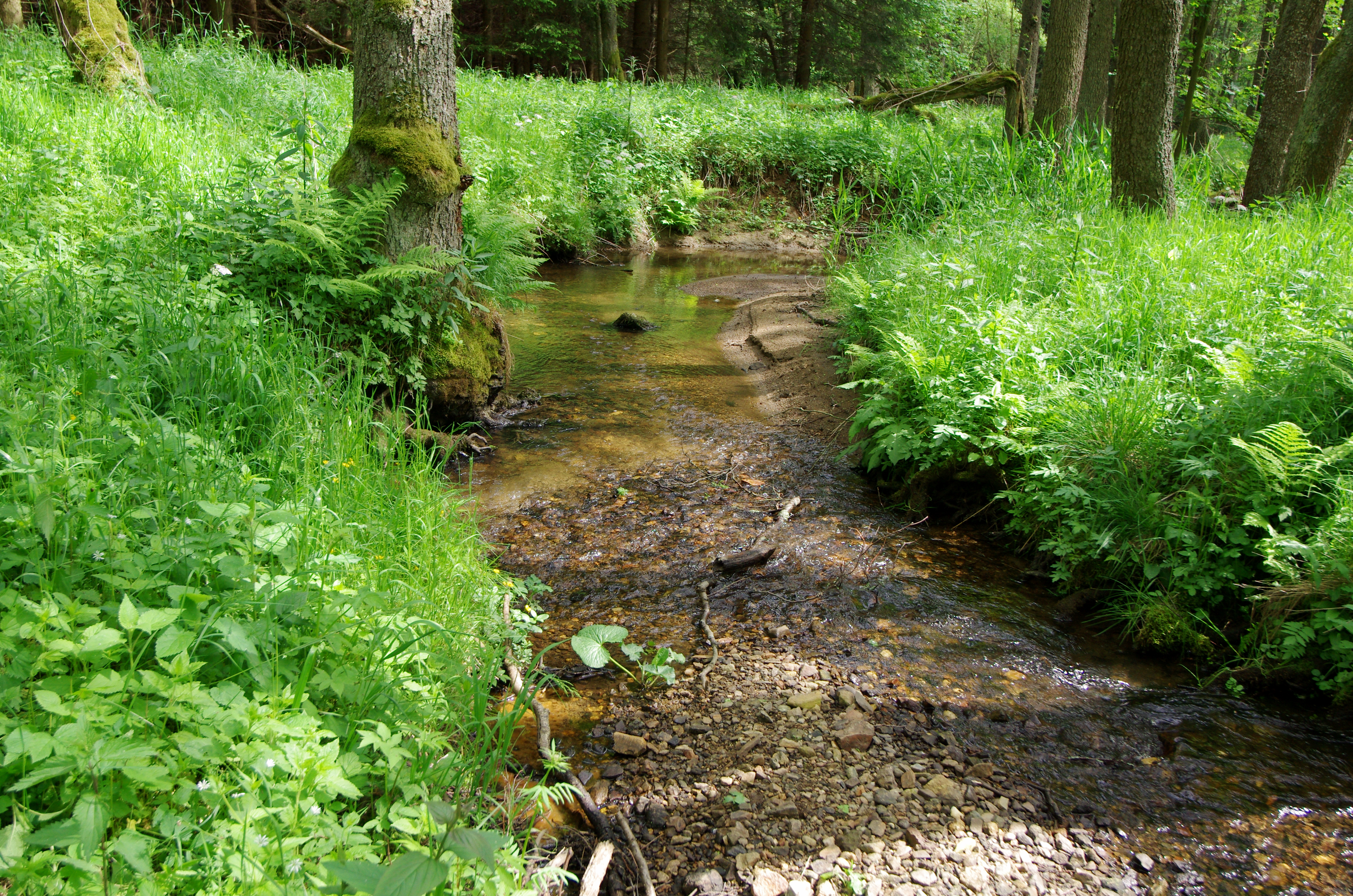 Jilmový potok u Milhostovských mofet, okres Cheb